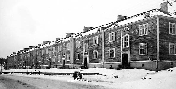 Pirkankatu 29-35 eli Kilometritalo 1920-luvun lopulla. Hirsirakenteinen puukerrostalo on peräti 138 metriä pitkä. Kuva: H. Rantakallio, Tampereen museoiden kuva-arkisto.